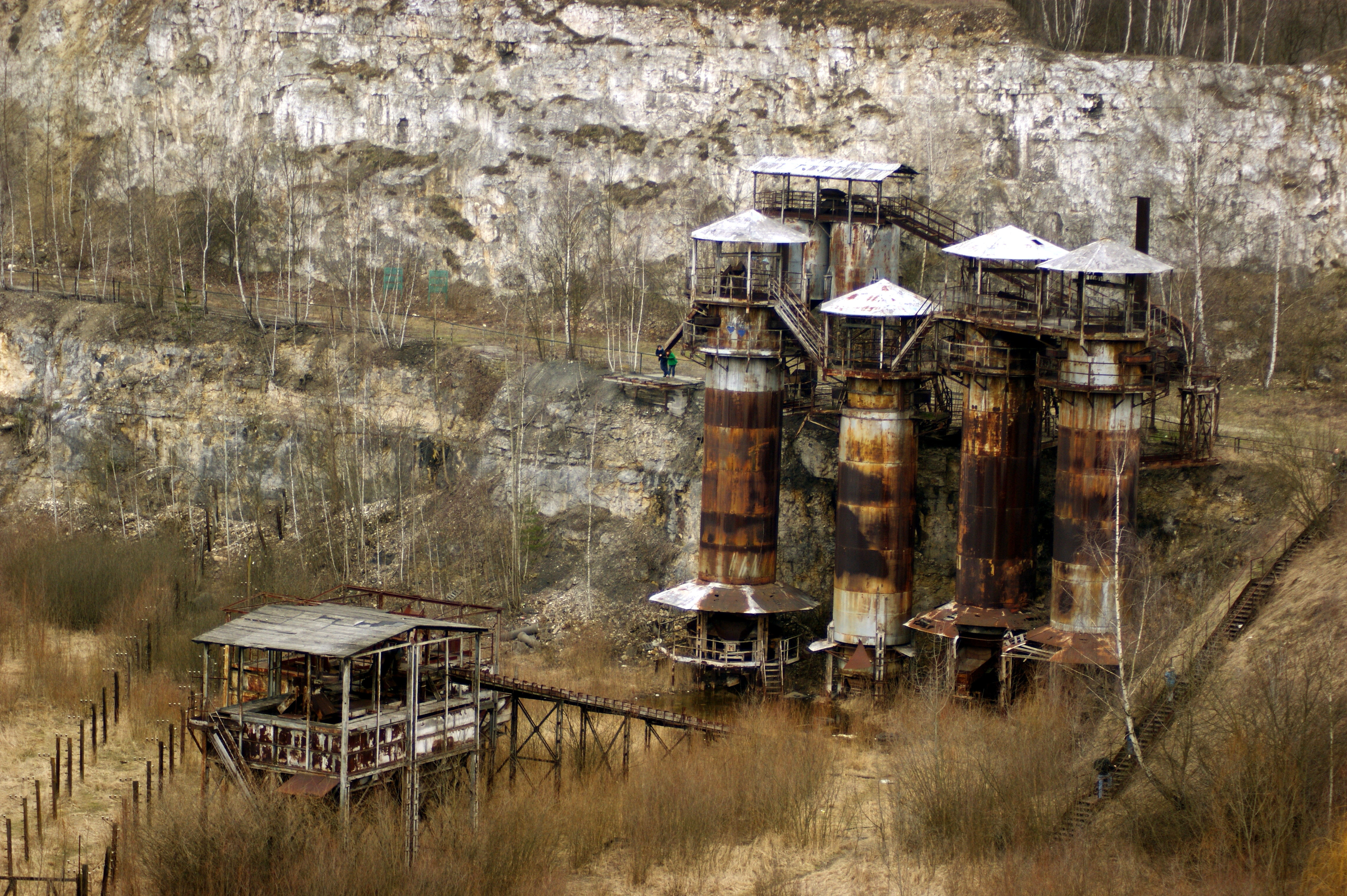 KZ Plaszow